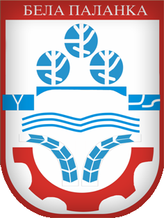 Blason de la ville de Bela Palanka en Serbie